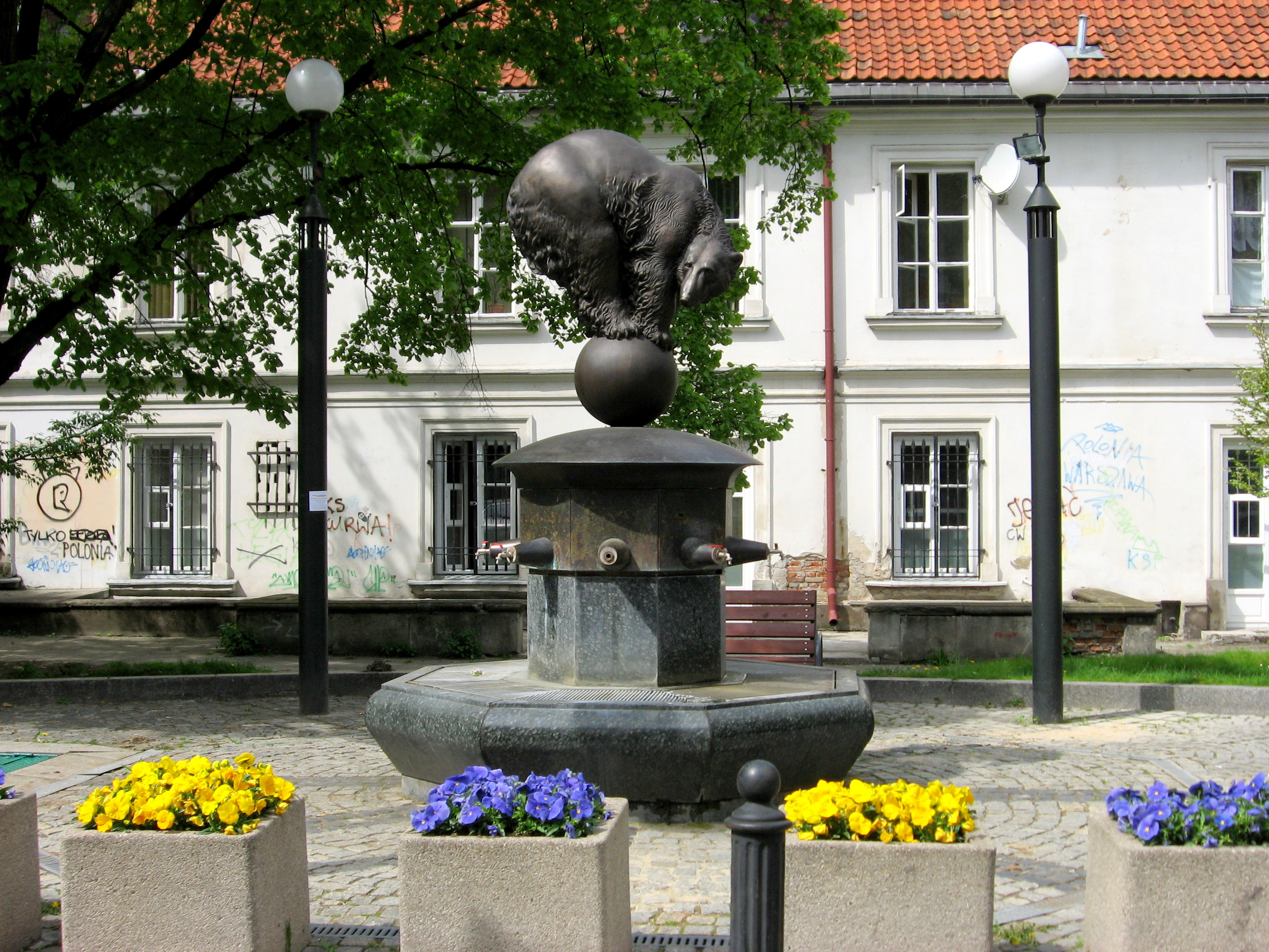 Warszawa